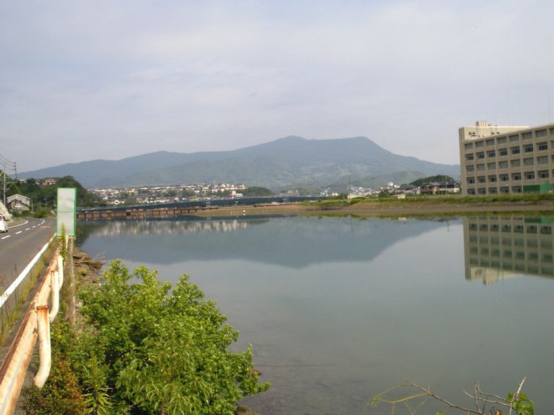 早岐瀬戸。国見山塊を水面に映す。長崎県佐世保市